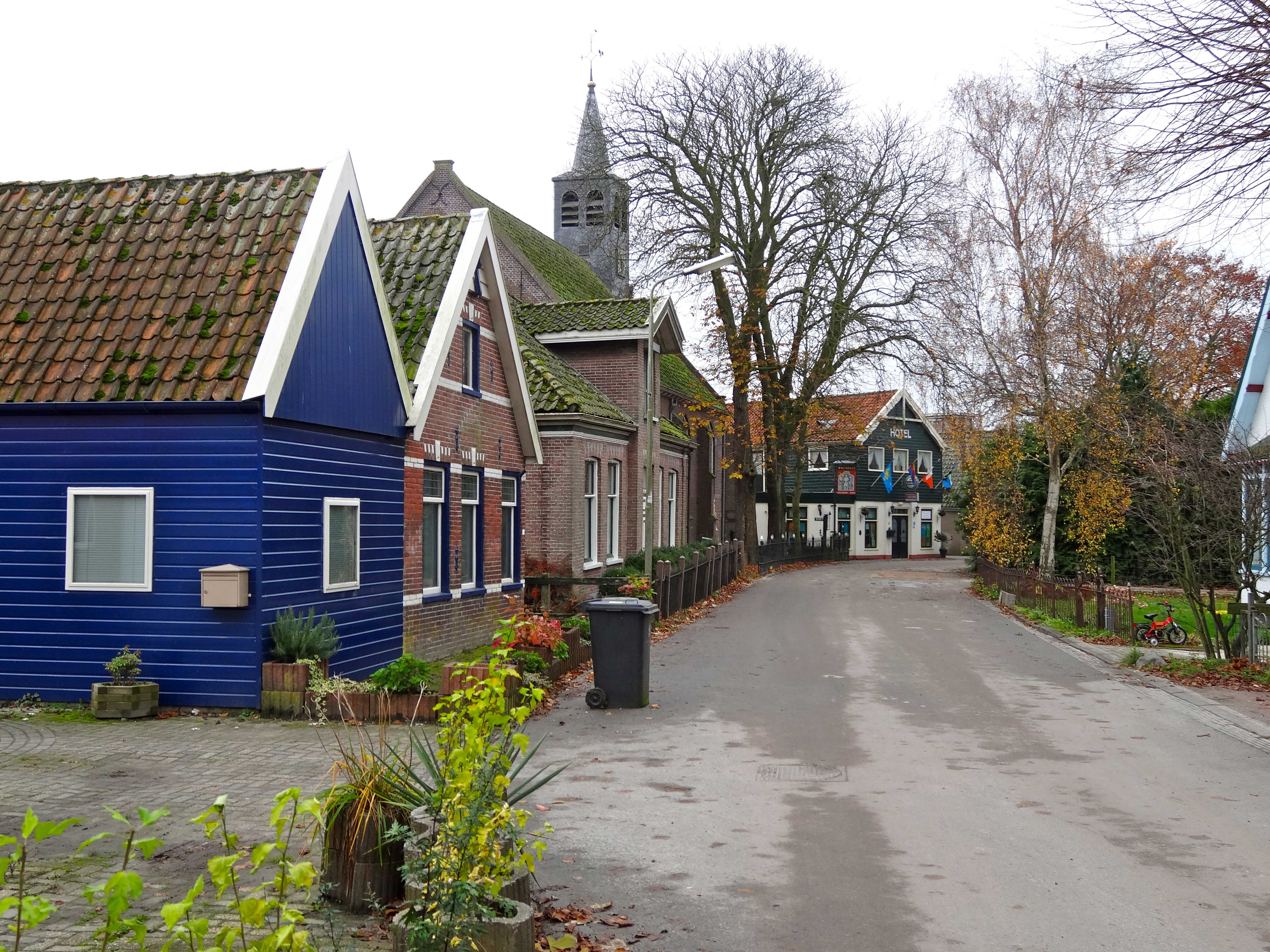 Dorpsgezicht Oosterleek